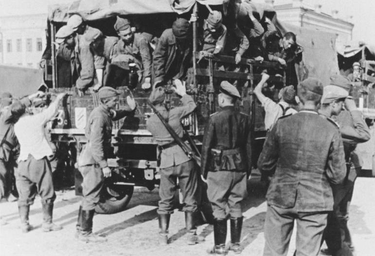 Heeresfilmstelle. Bildarchiv. 355 .415 .8(47) Im Kriegsgefangenenlager Shitomir. Russische Gefangene werden zum Abtransport auf Lkw verladen. Aufnahme: 24.7.41 Ort: Shitomir, Ukraine Land: Russland Negativ-Nr.: M.229/15a